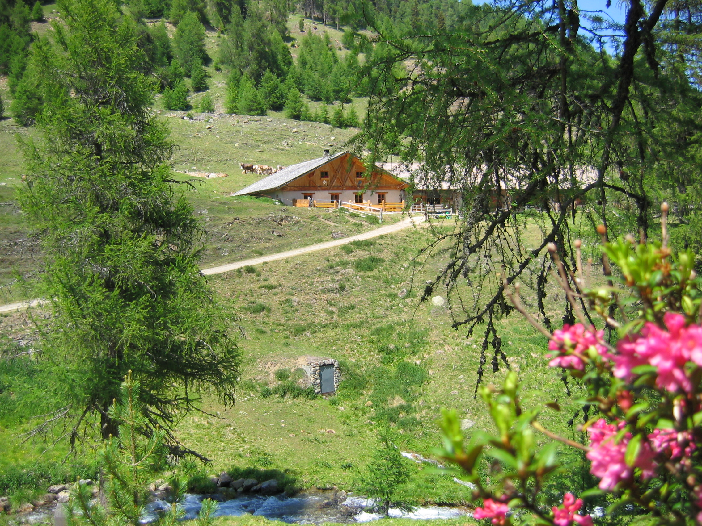 Brugger Alm im Zerzertal